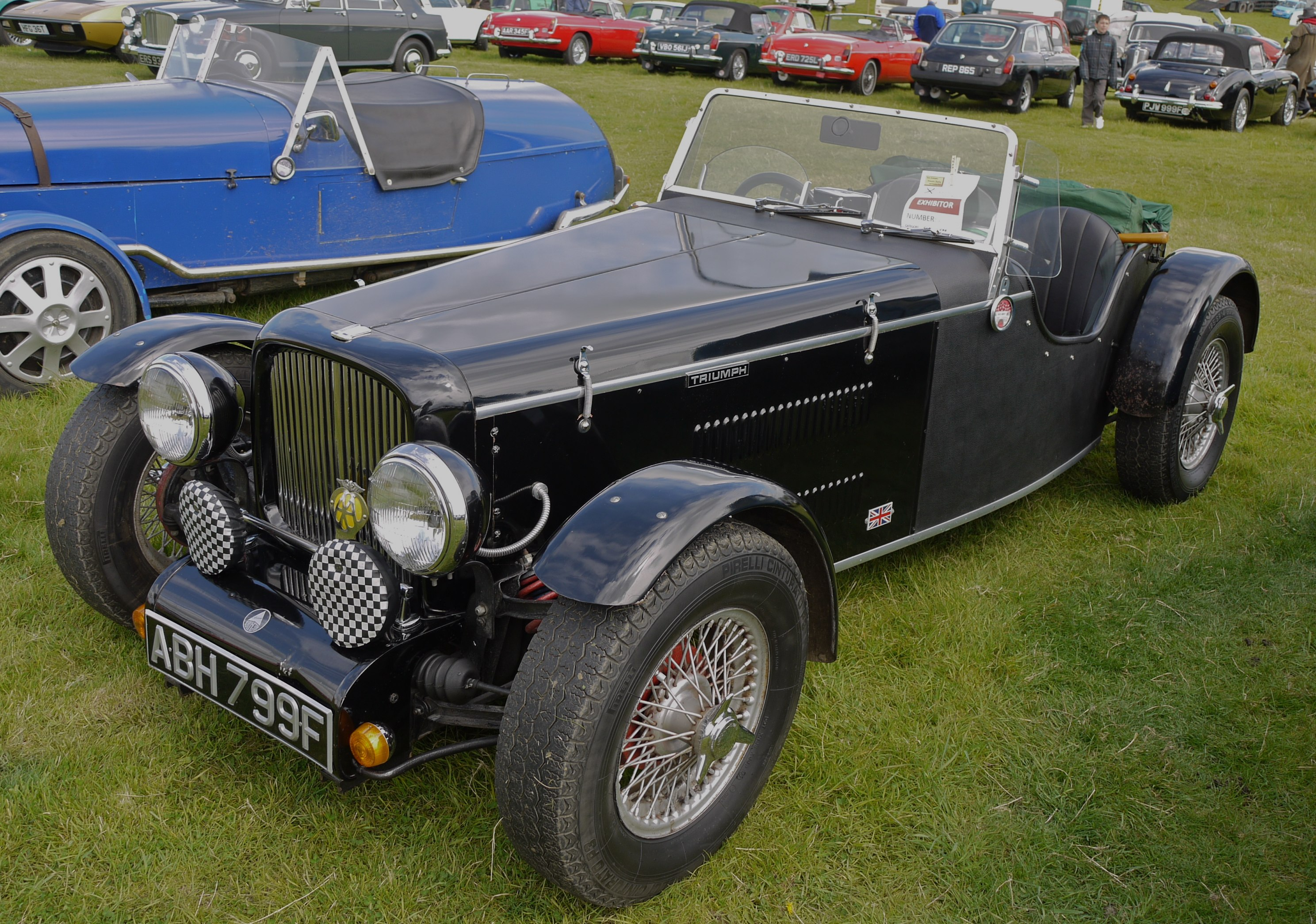 Panasonic G1 14-45 Lens